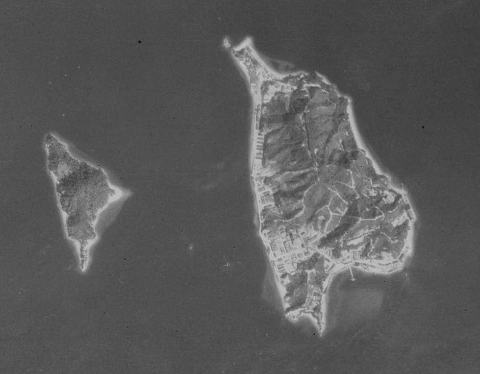 1948年広島県竹原市の大久野島および小久野島